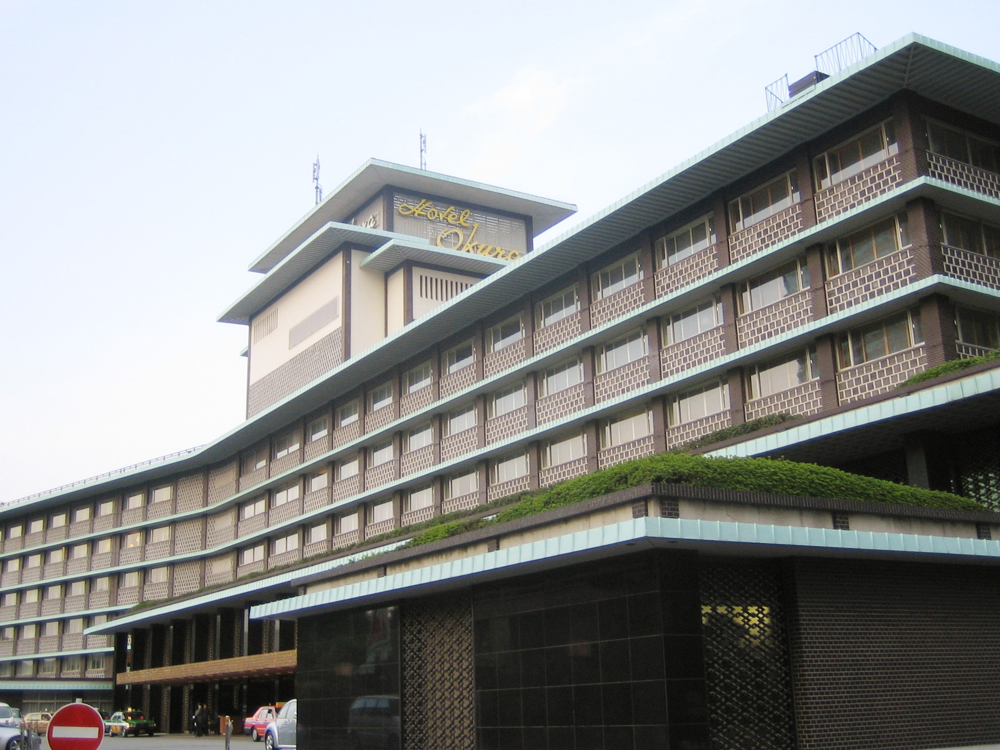 Hotel Okura (ホテルオークラ), in Minato, Tokyo, Japan